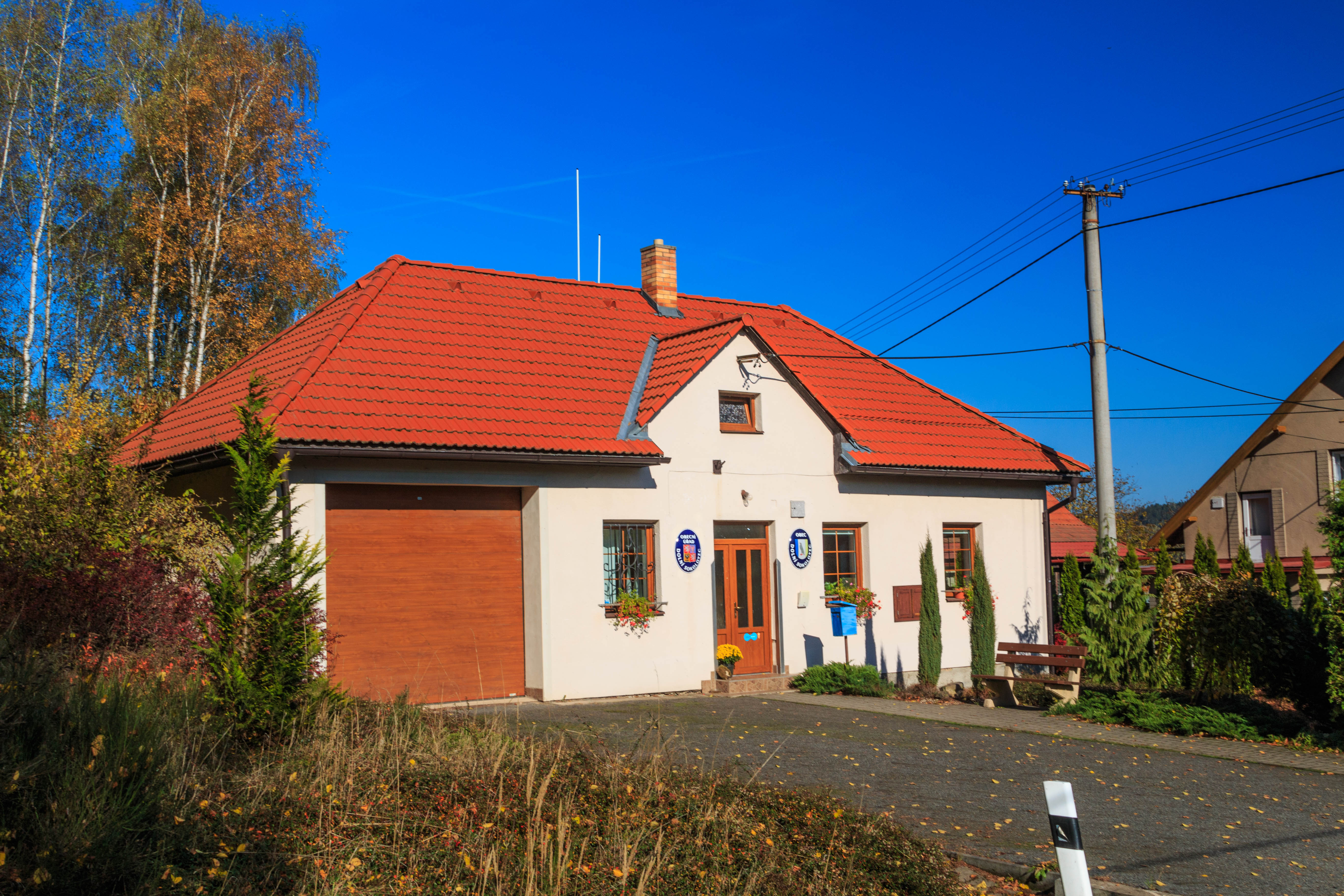 Dolní Sokolovec obecní úřad